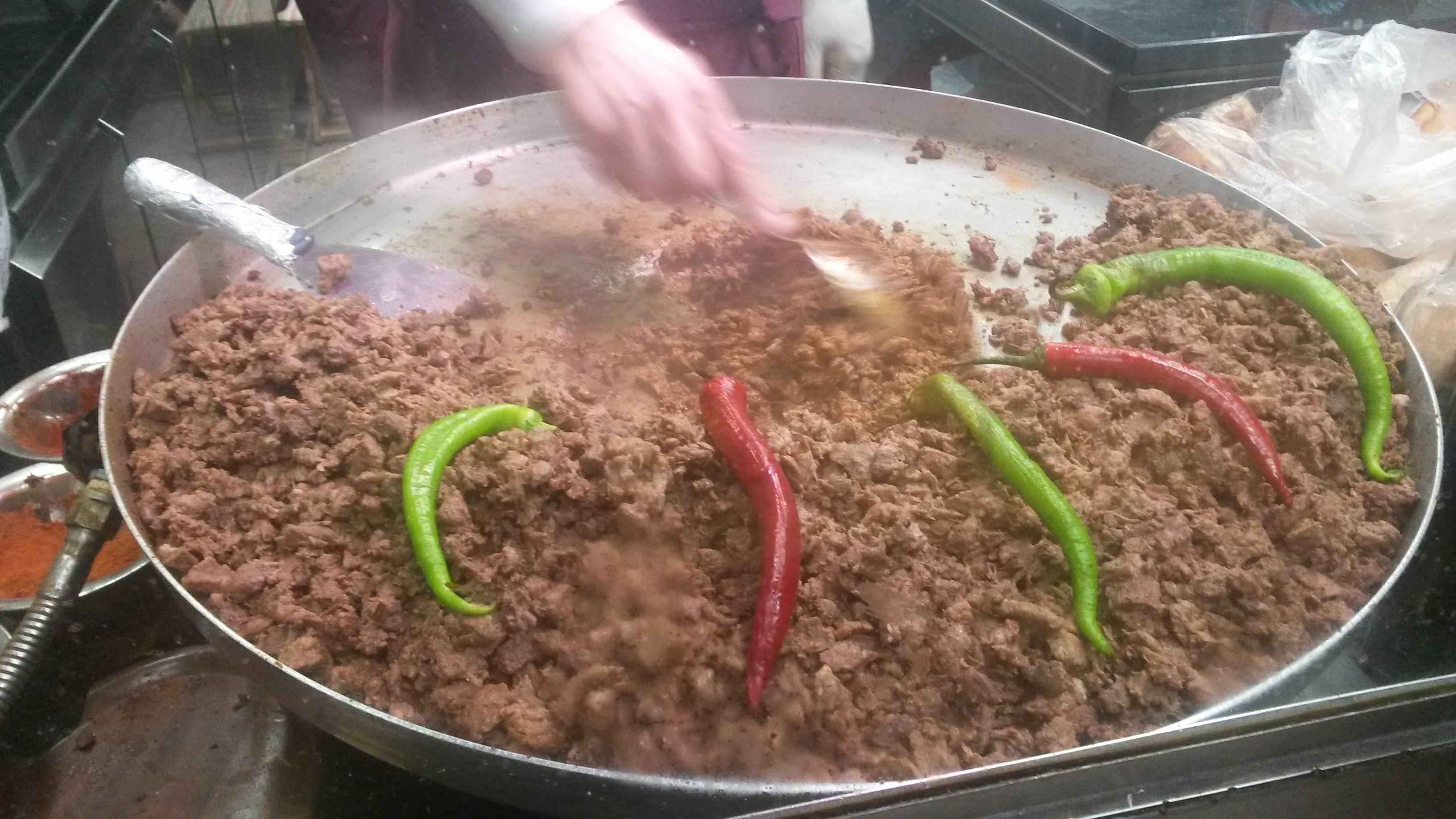 Tantuni während der Zubereitung